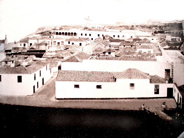 Antiguo Barrio de el Cabo 1869 Foto tomada desde la Iglesia de la Concepción, a la derecha el puente de hierro, edificio de frente el hospital viejo, a la izquierda en lo alto la ermita de San Telmo y los arcos del fondo el cuartel de San Carlos.